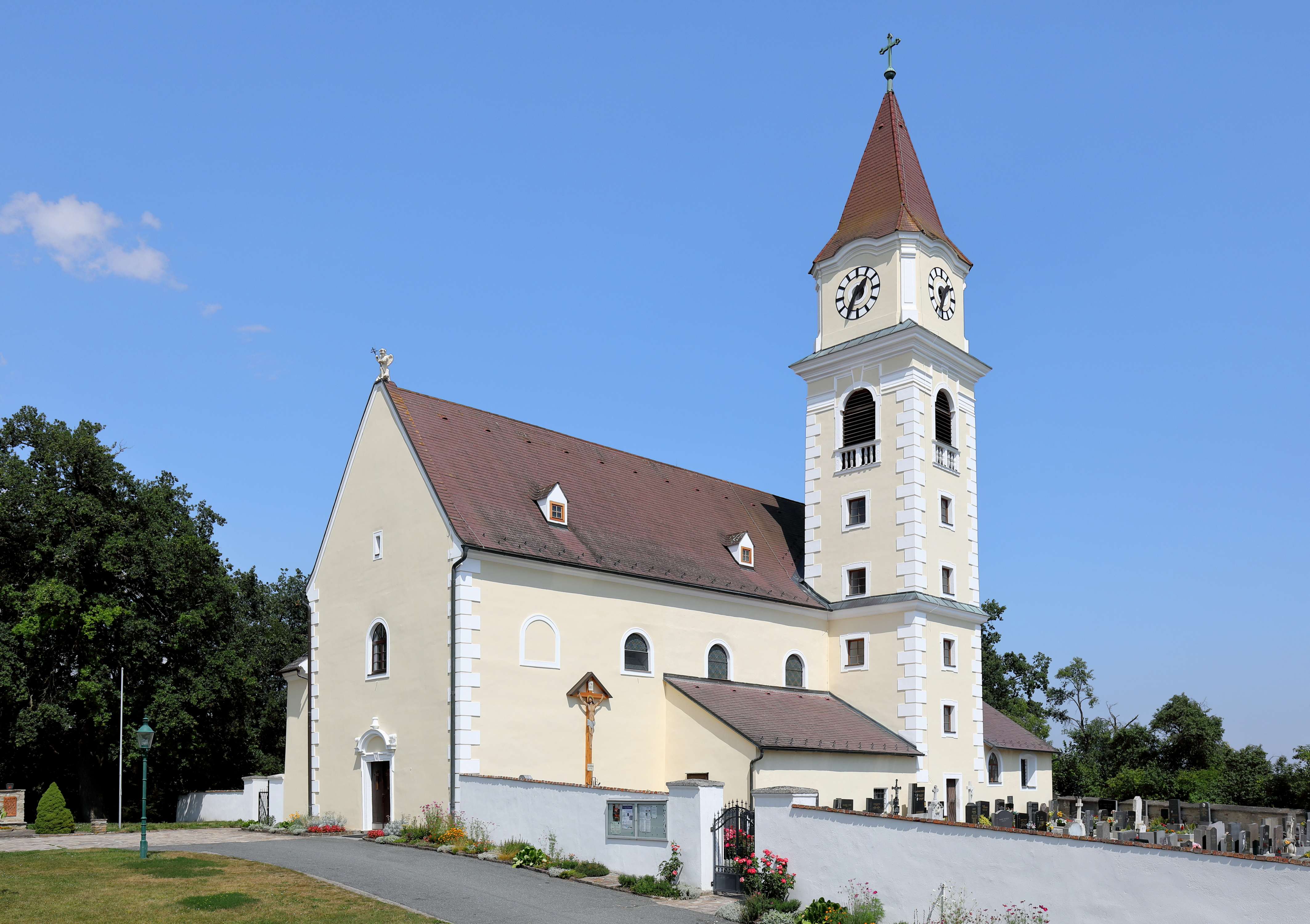 Südostansicht der röm.-kath. Pfarrkirche hl. Michael, auch als „Maria Eich“ (Eich-Maria) bezeichnet, der niederösterreichischen Gemeinde Röhrenbach.Ursprünglich eine romanische Chorquadratkirche wurde die Kirche um 1500 mit einem spätgotischen Chor mit Fünfachtelschluss erweitert. Ende des 17. Jahrhunderts fand ein umfassender Umbau statt, dabei wurde auch der Turm errichtet, und in der ersten Hälfte des 18. Jahrhunderts erfolgte die Barockisierung des Innenraums.